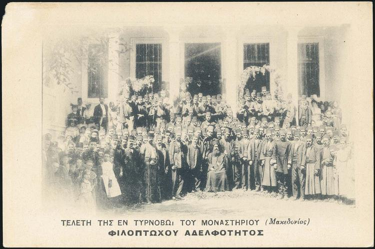 Гръцкото училище в арумънското село Търново, Битолско, днес Република Македония